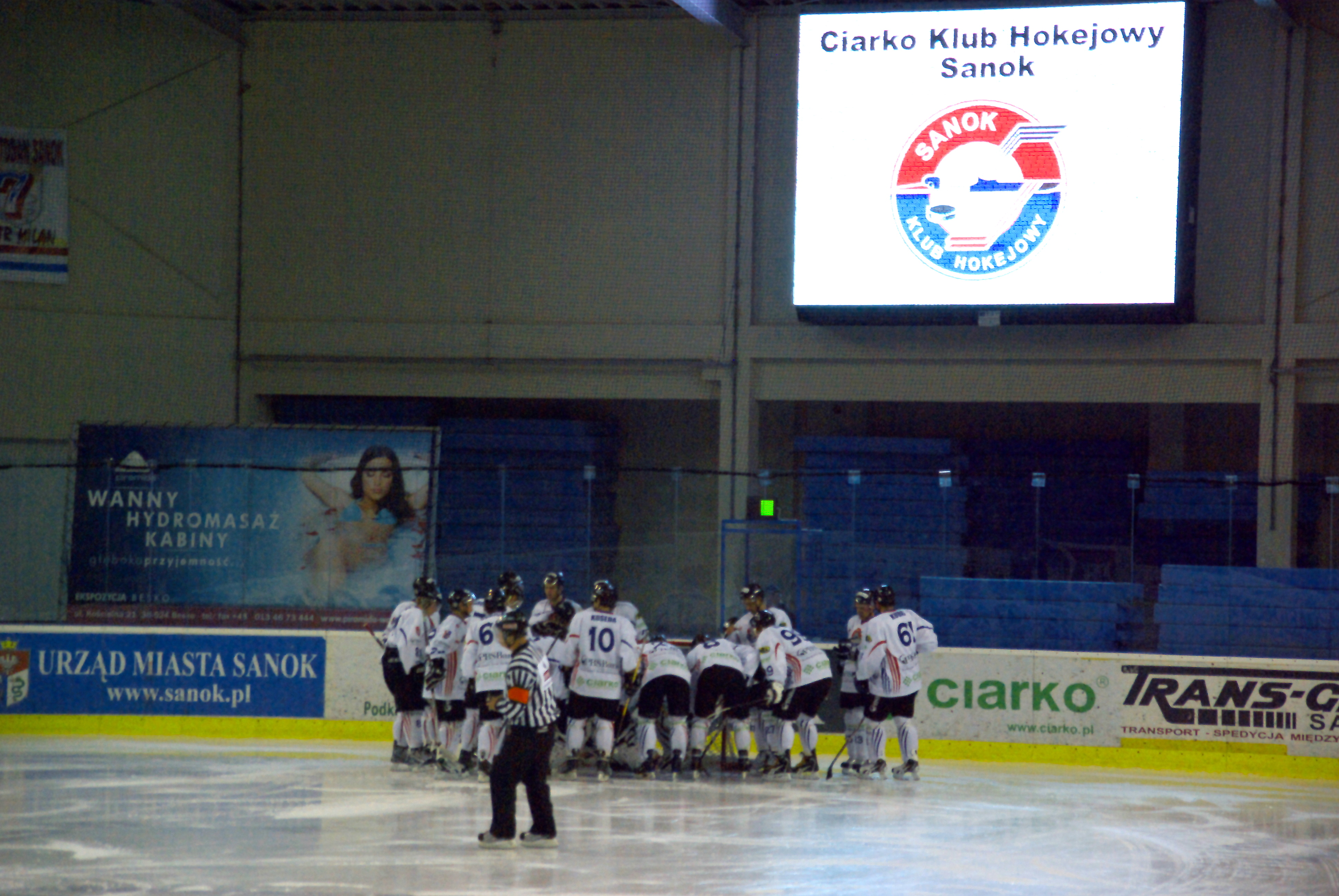 Drużyna Ciarko KH Sanok przed meczem z JKH Jastrzębie (19.09.2010)